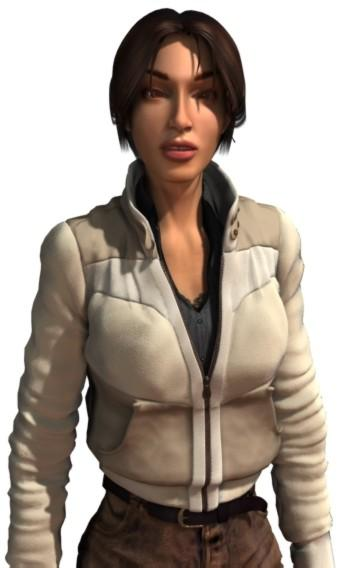 Capture d'écran du jeu vidéo Syberia (2002), développé et édité par Microïds. Kate Walker, héroïne du jeu, incarnée par les joueurs.